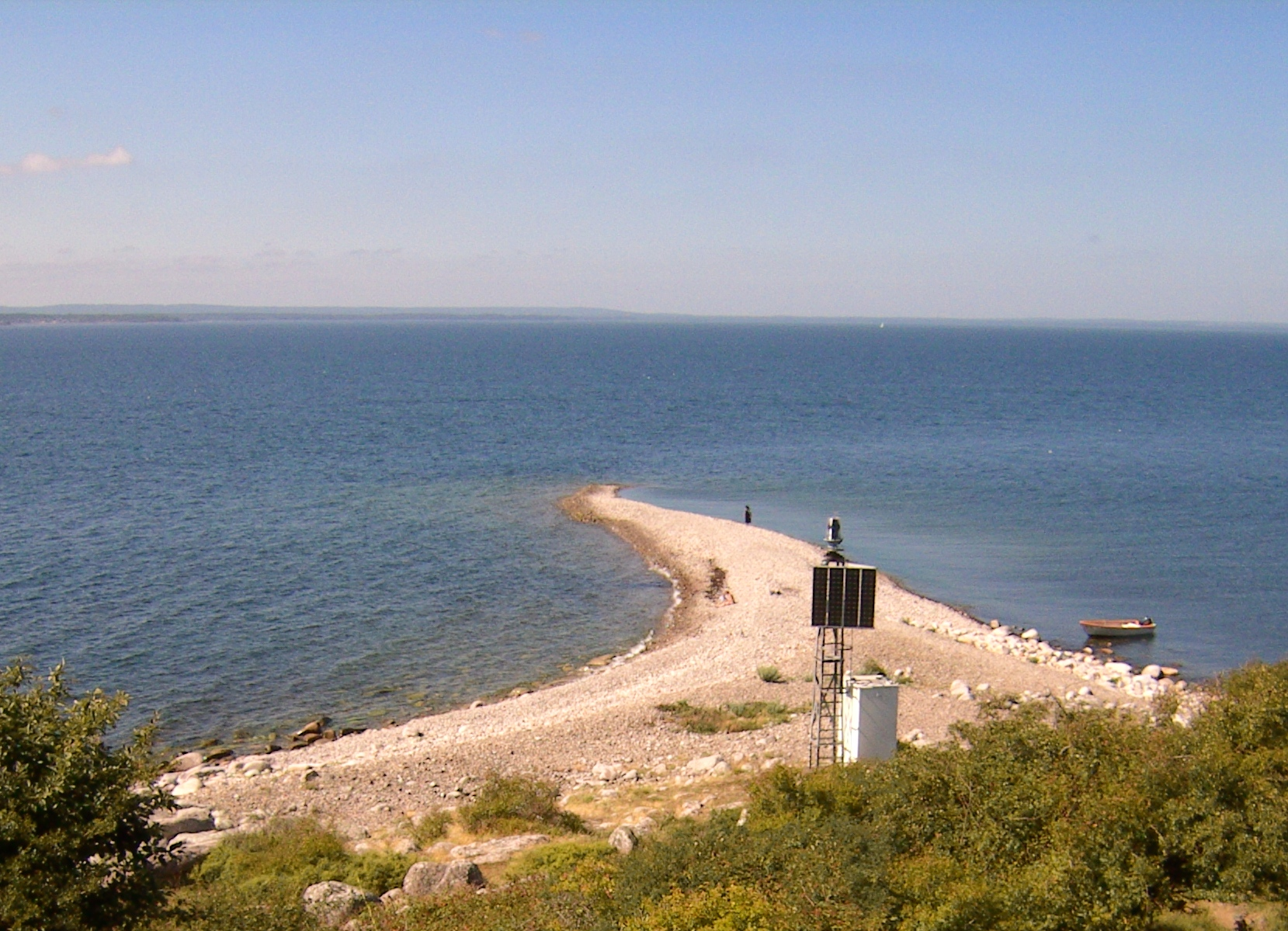 Bönsäcken på Hanö.